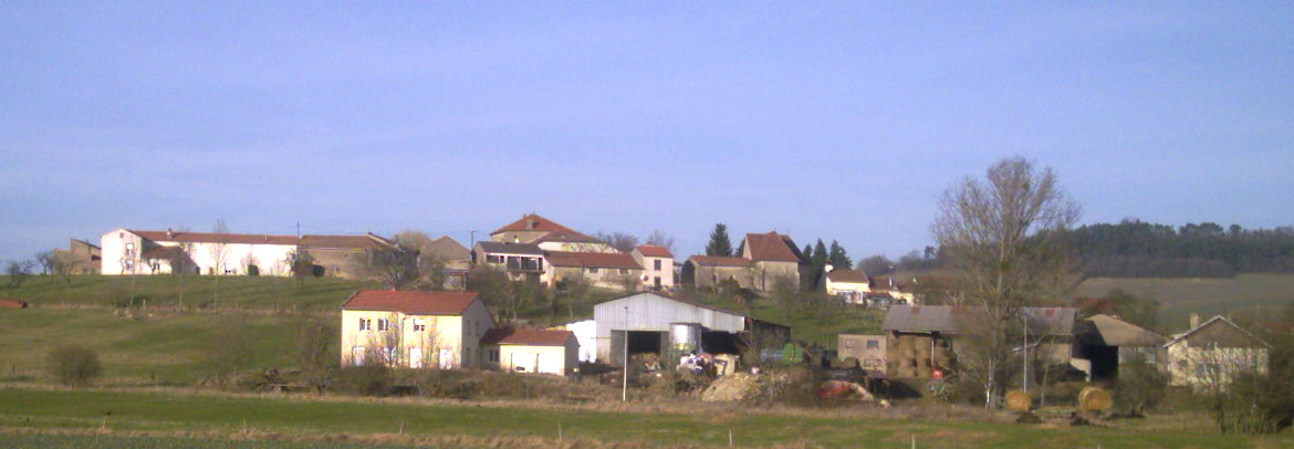 Dommartin-sous-Amance depuis la route venant d'Agincourt